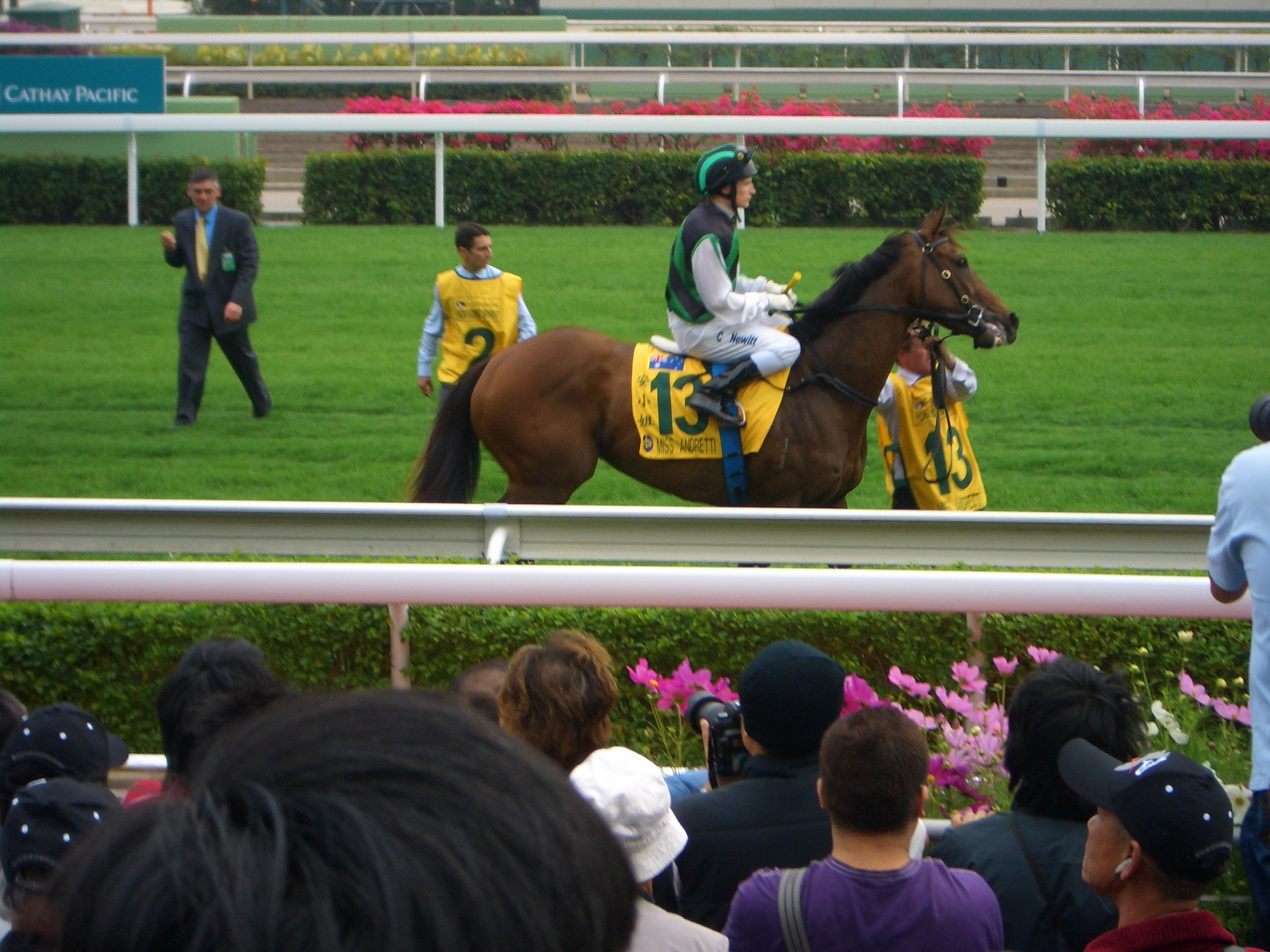 Miss Andretti starting for 2007 Hong Kong Spirit